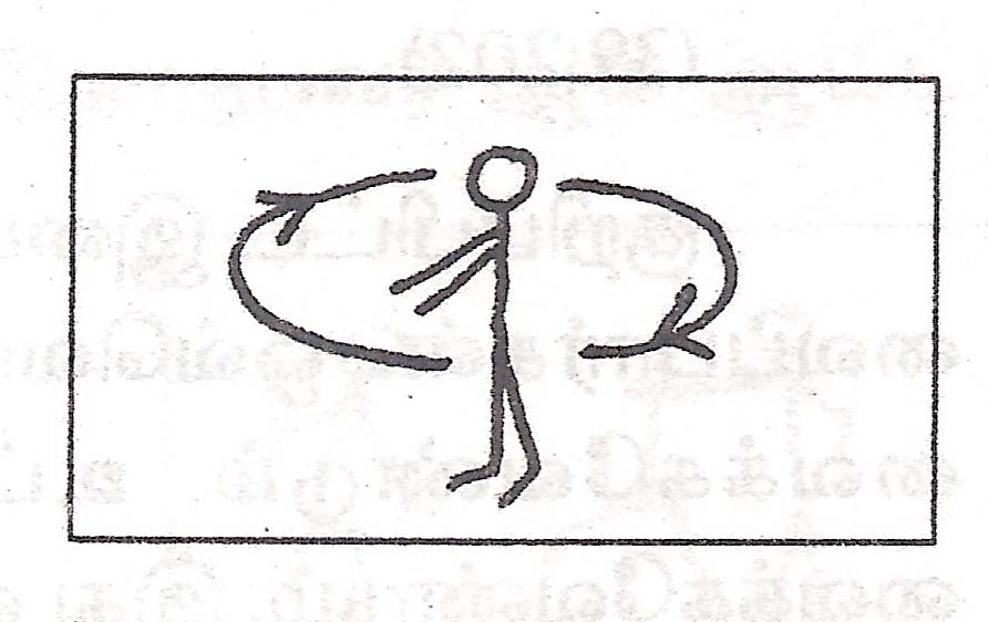 விளையாட்டு, கரகர வண்டி, கோட்டுருவ விளக்கப்படம், - மறைகின்ற விளையாட்டுகள் என்னும் எனது நூலிலிருந்து எடுக்கப்பட்டது.